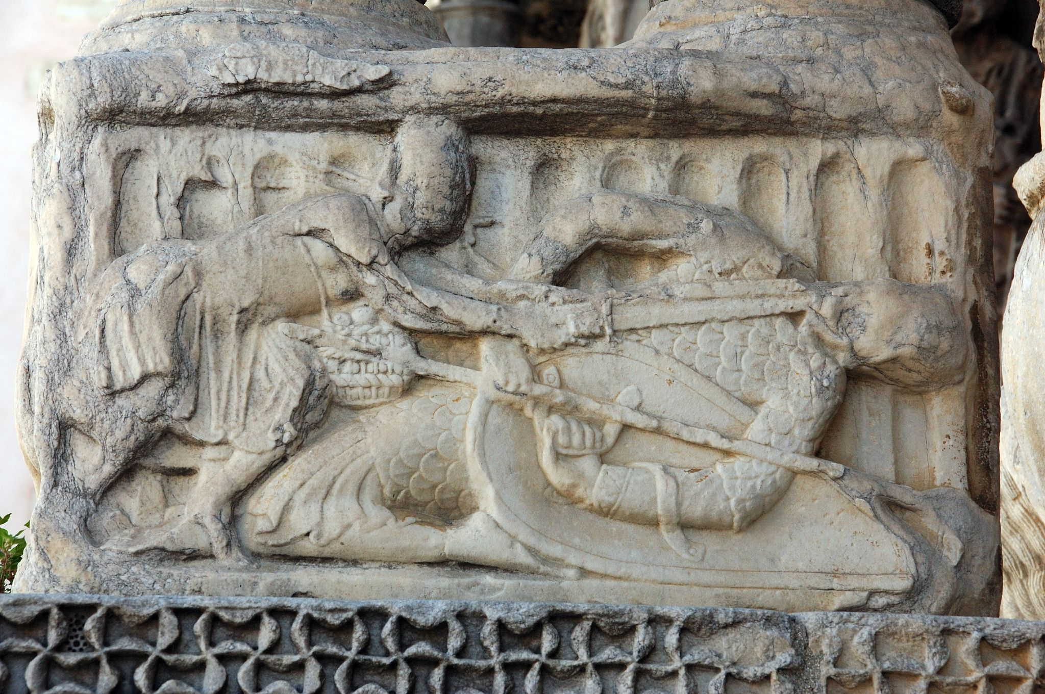 Romanesque church of Saint-Gilles-du-Gard, Saint-Gilles, département du Gard, France